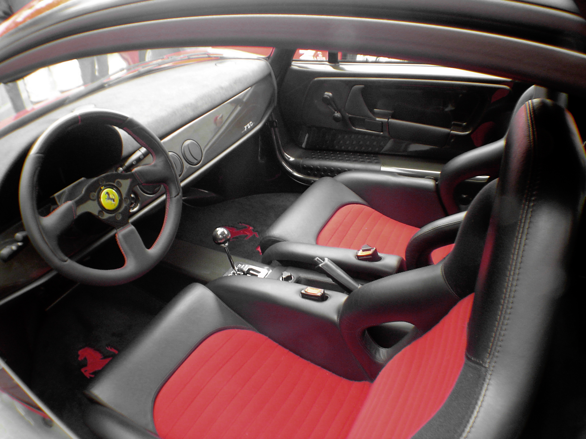 ferrari f50 interior